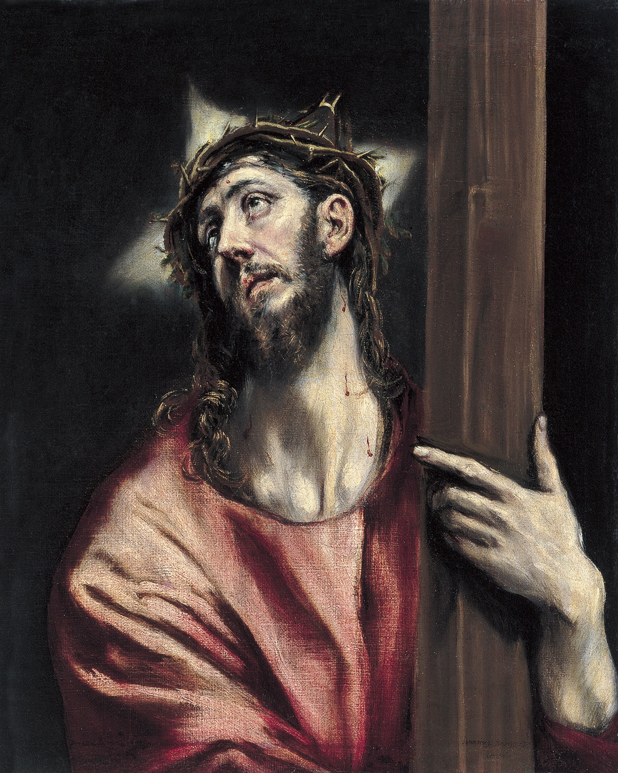 La obra representa a Jesucristo cargando con la cruz en la que sería crucificado, y es una de las tres obras de El Greco que se conservan en el Museo Thyssen-Bornemisza de Madrid, (España).